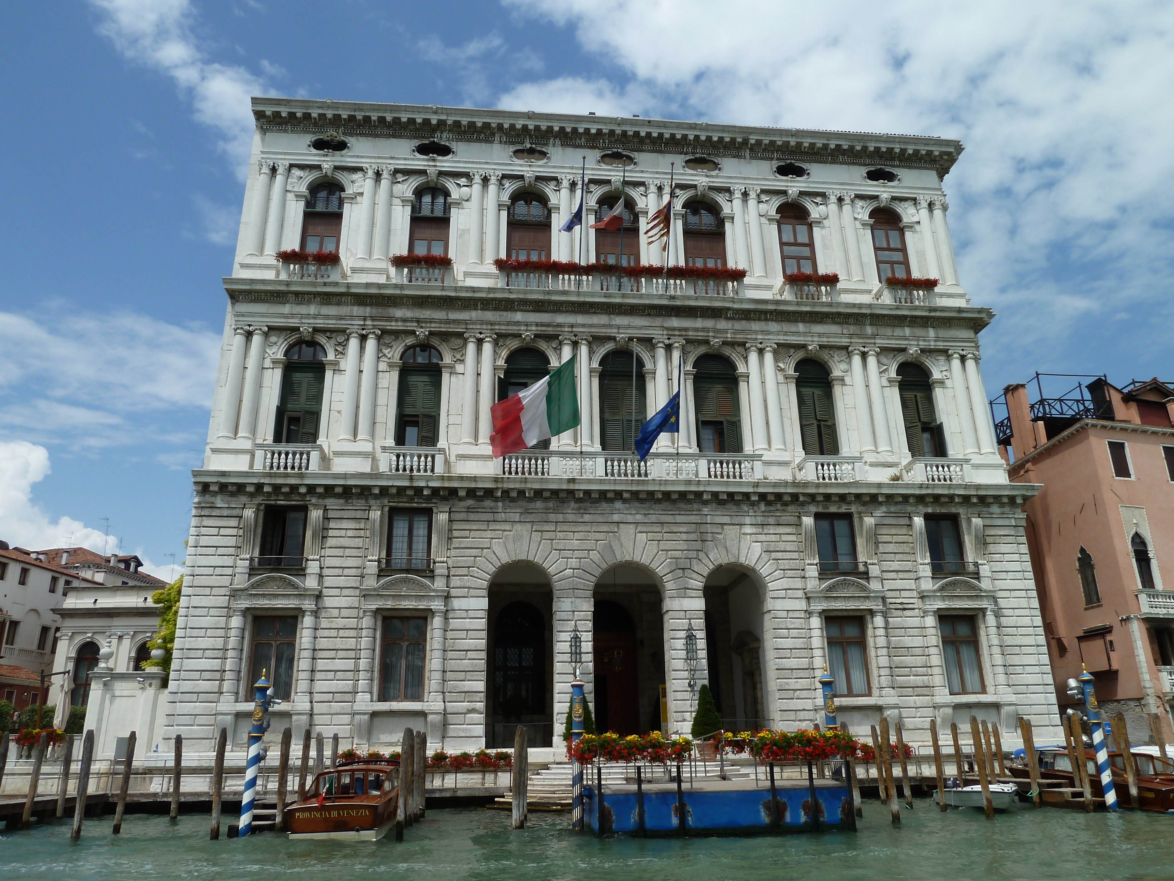 Palazzo Corner della Ca' Granda